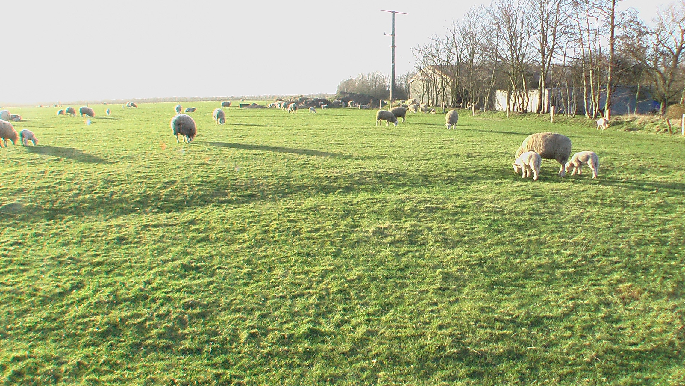 SchafeAufFöhr2008